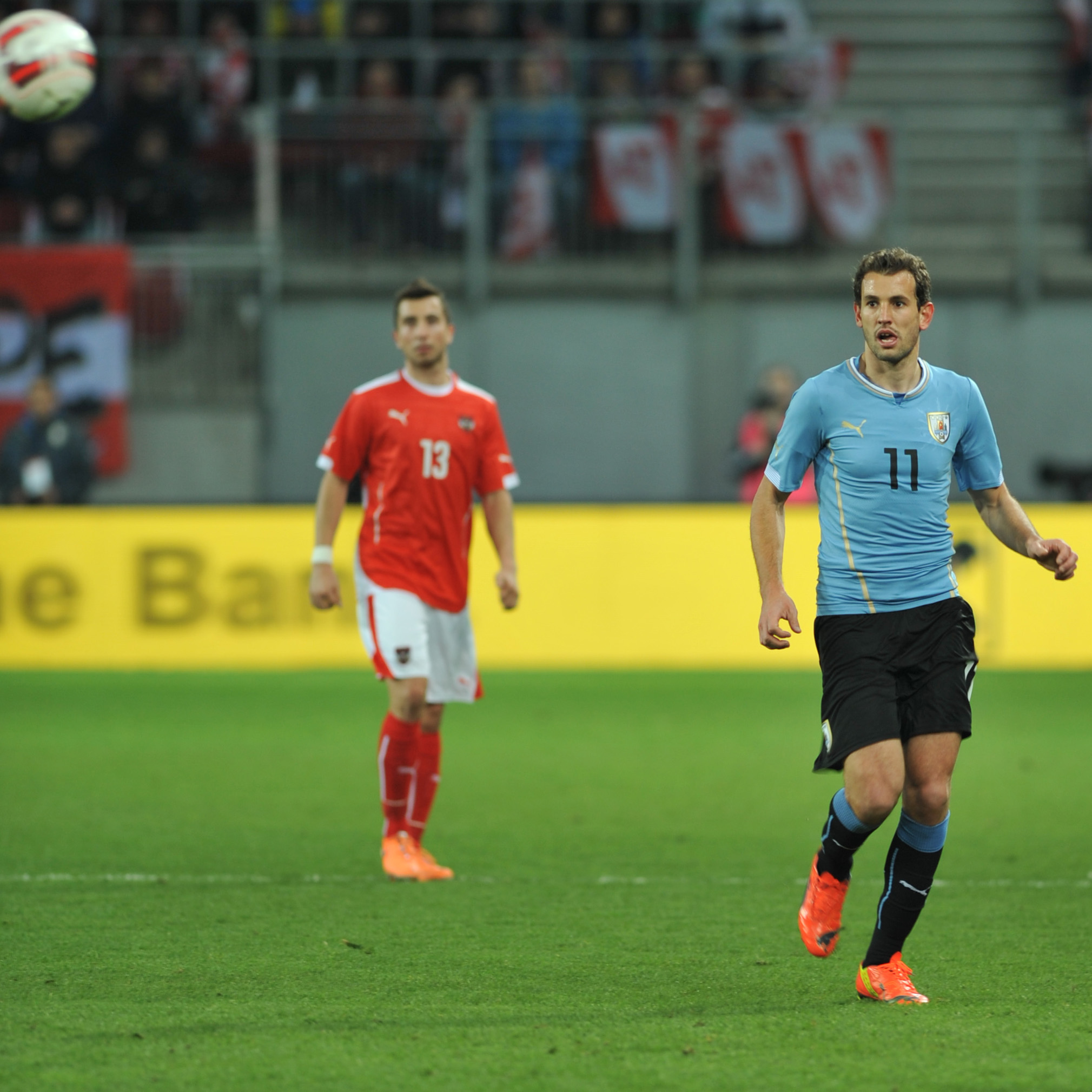 Freundschaftliches Länderspiel Österreich - Uruguay am 5. März 2014 in Klagenfurt: Christian Stuani